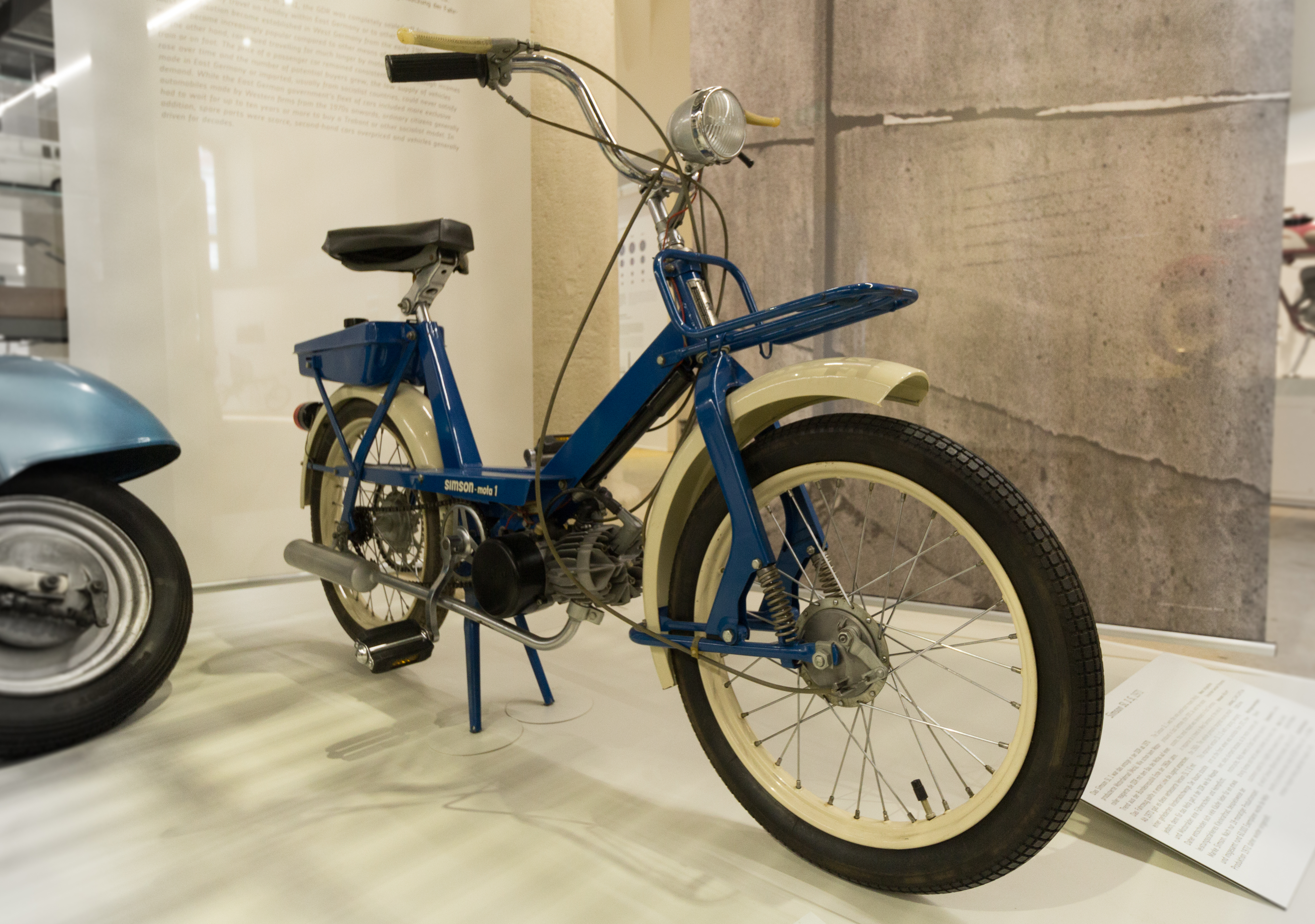 Simson mofa SL1 - Verkehrsmuseum Dresden